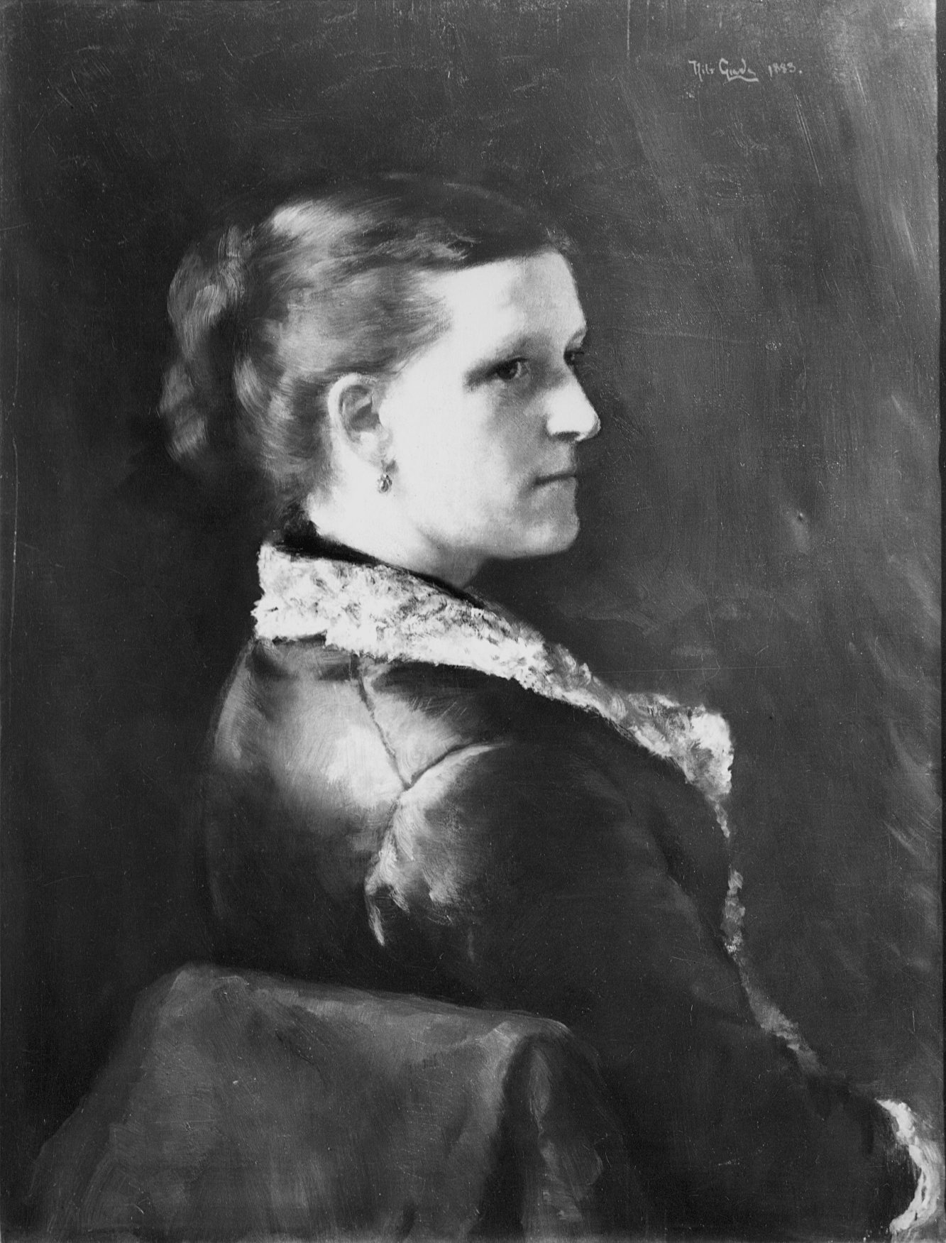 Elise Løvenskiold (1844-1923) født Wedel Jarlsberg, overhoffmesterinne ved Dronning Sophies hoff. Avfotografering av oljemaleri av Nils Gude, 1883